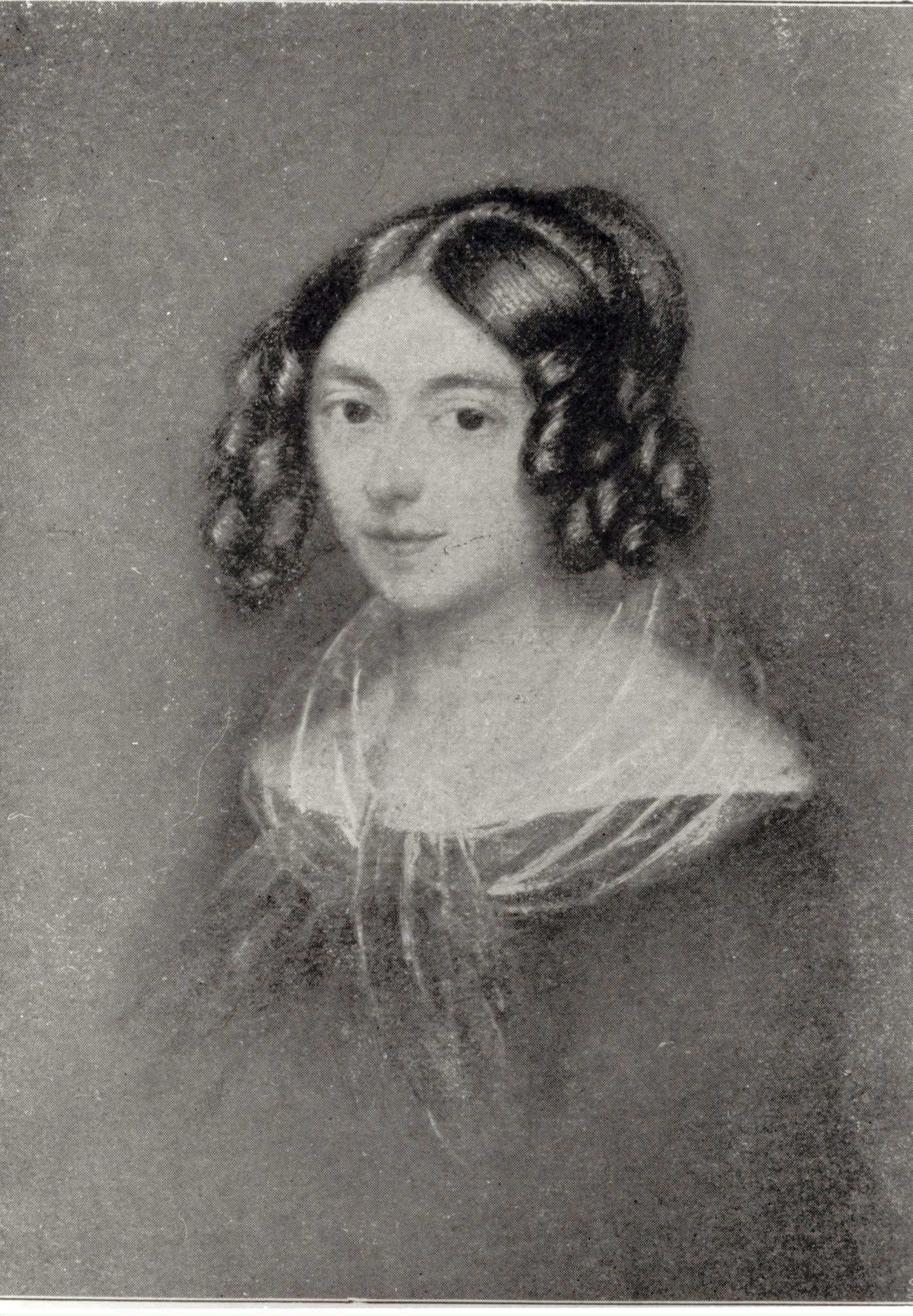 Portret Izabelli Chopin